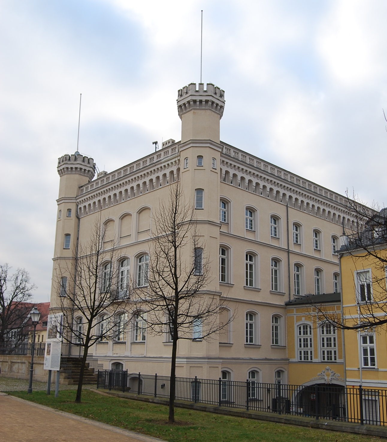 Gebäude des Wasser- und Schiffahrtsamtes in Magdeburg am Fürstenwall